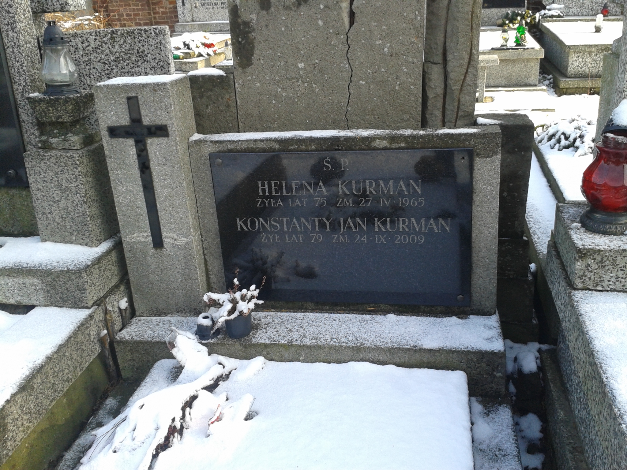 Grób prof. Konstantego Jana Kurmana na Cmentarzu Bródnowskim (kw. 114L rząd 2 grób 10)